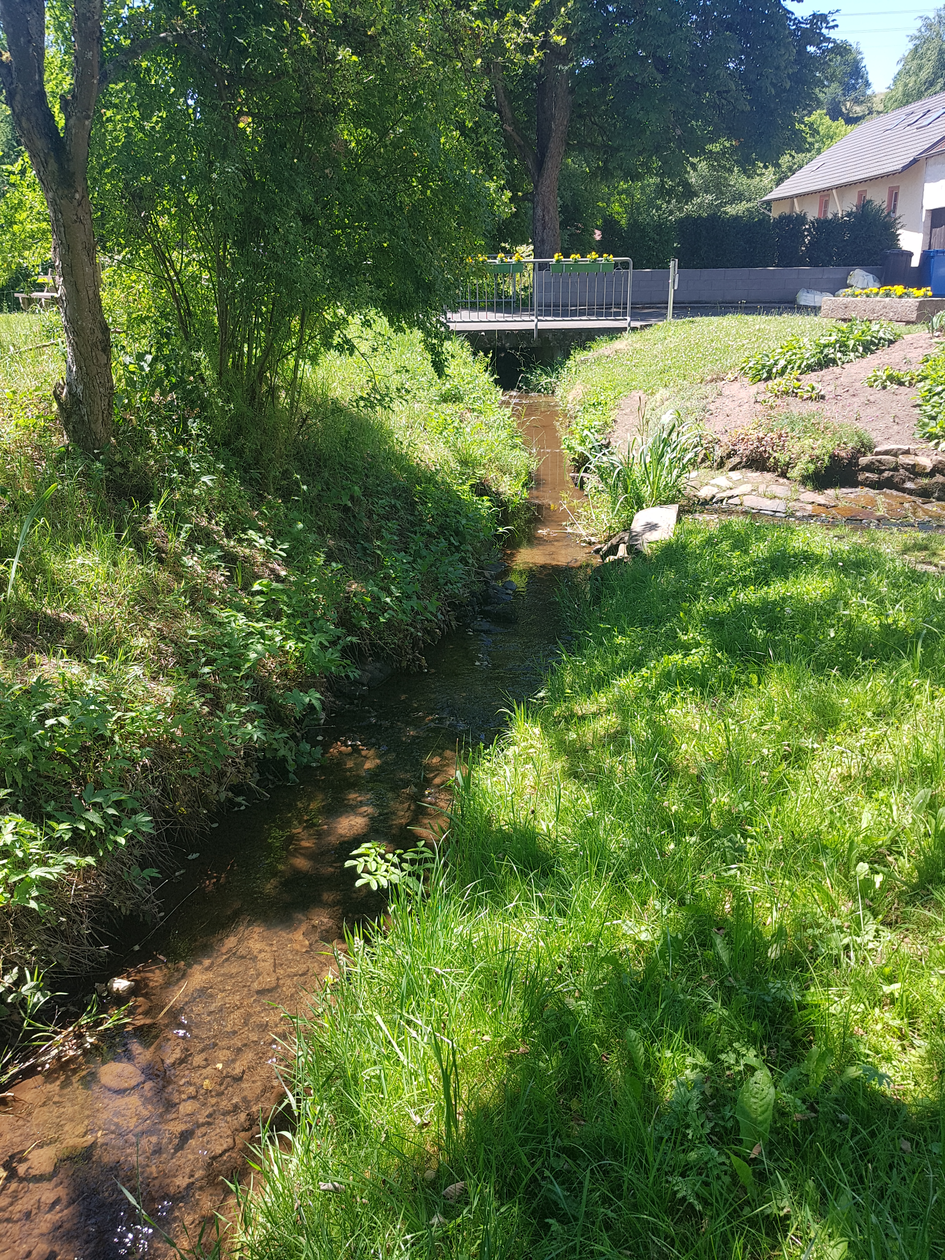 Aufgenommen am 28.06.2019